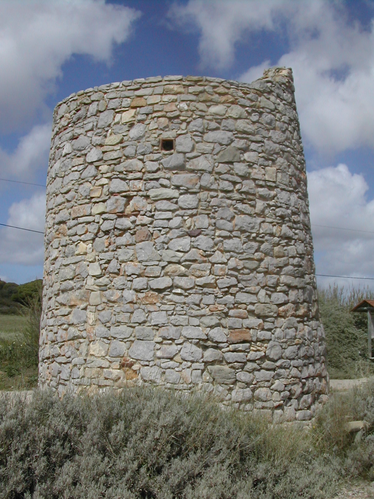 Torre de Aires, Luz, Tavira, Algarve, Portugal